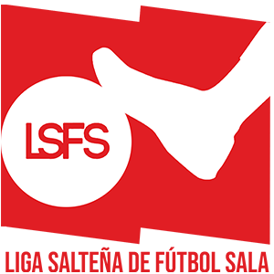 Logo Liga Salteña de Fútbol Sala